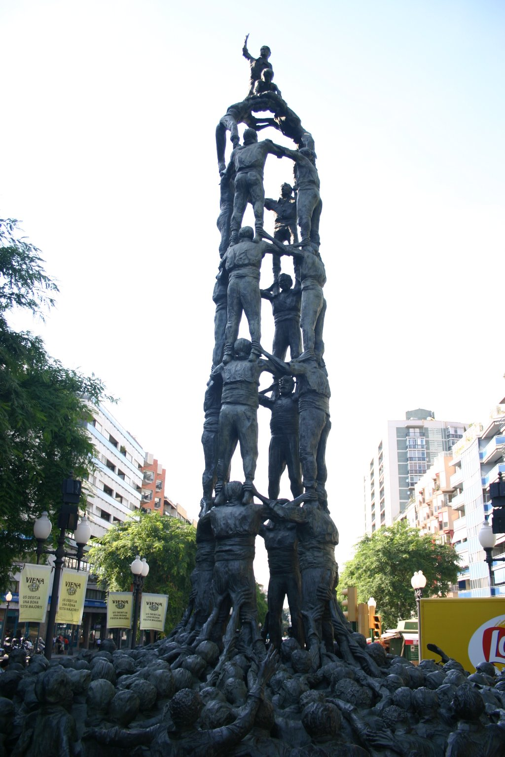 Tarragona. Estatua Castellers